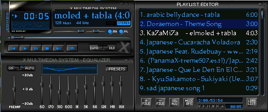 എക്സ്-എം-എം-എസ്-സ്വതന്ത്ര-മൾട്ടിമീഡിയ-പ്ലയർ-സ്ക്രീൻ-ഷോട്ട്